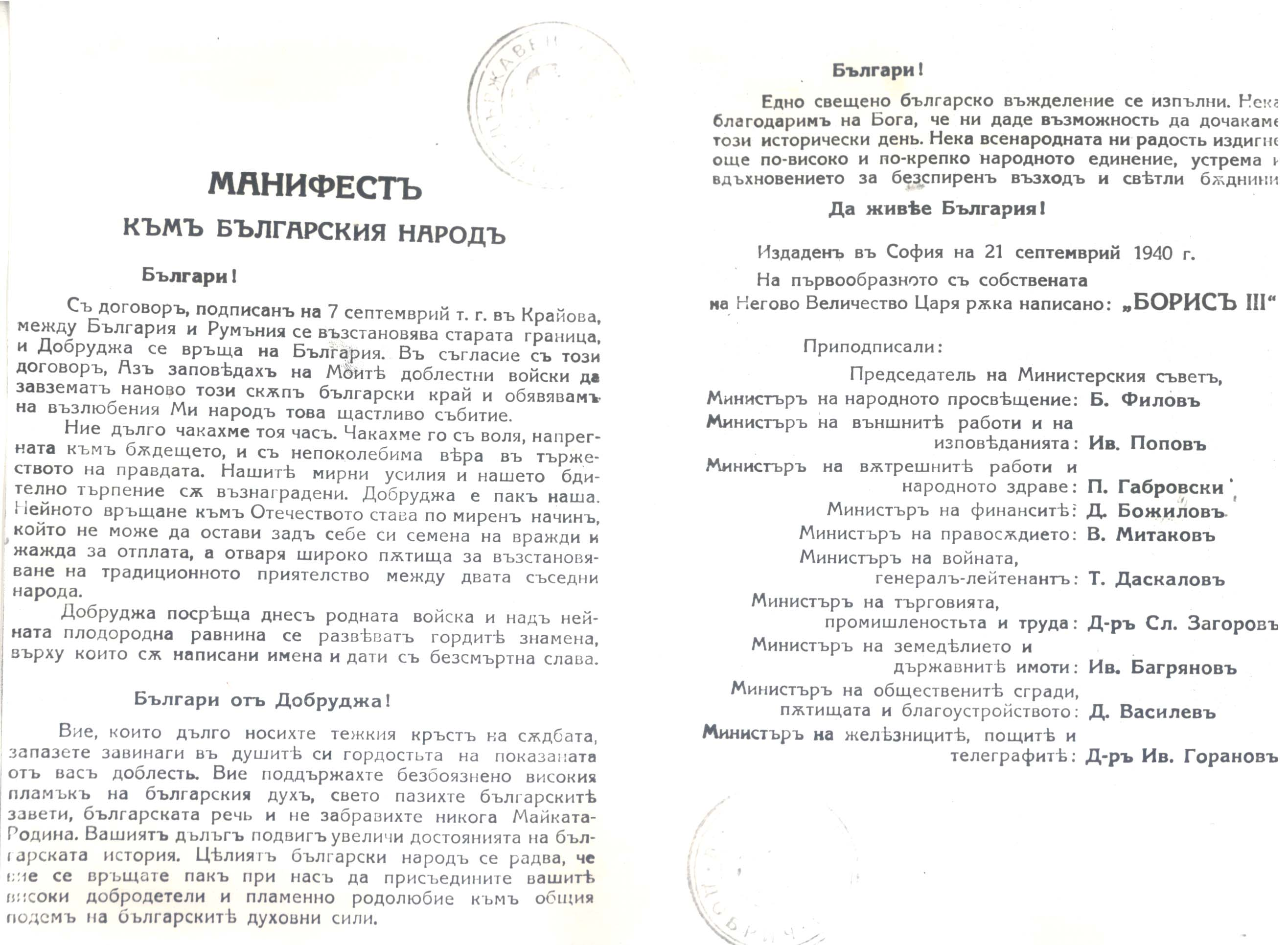 Манифест по повод връщането на Южна Добруджа в рамките на Бълагария